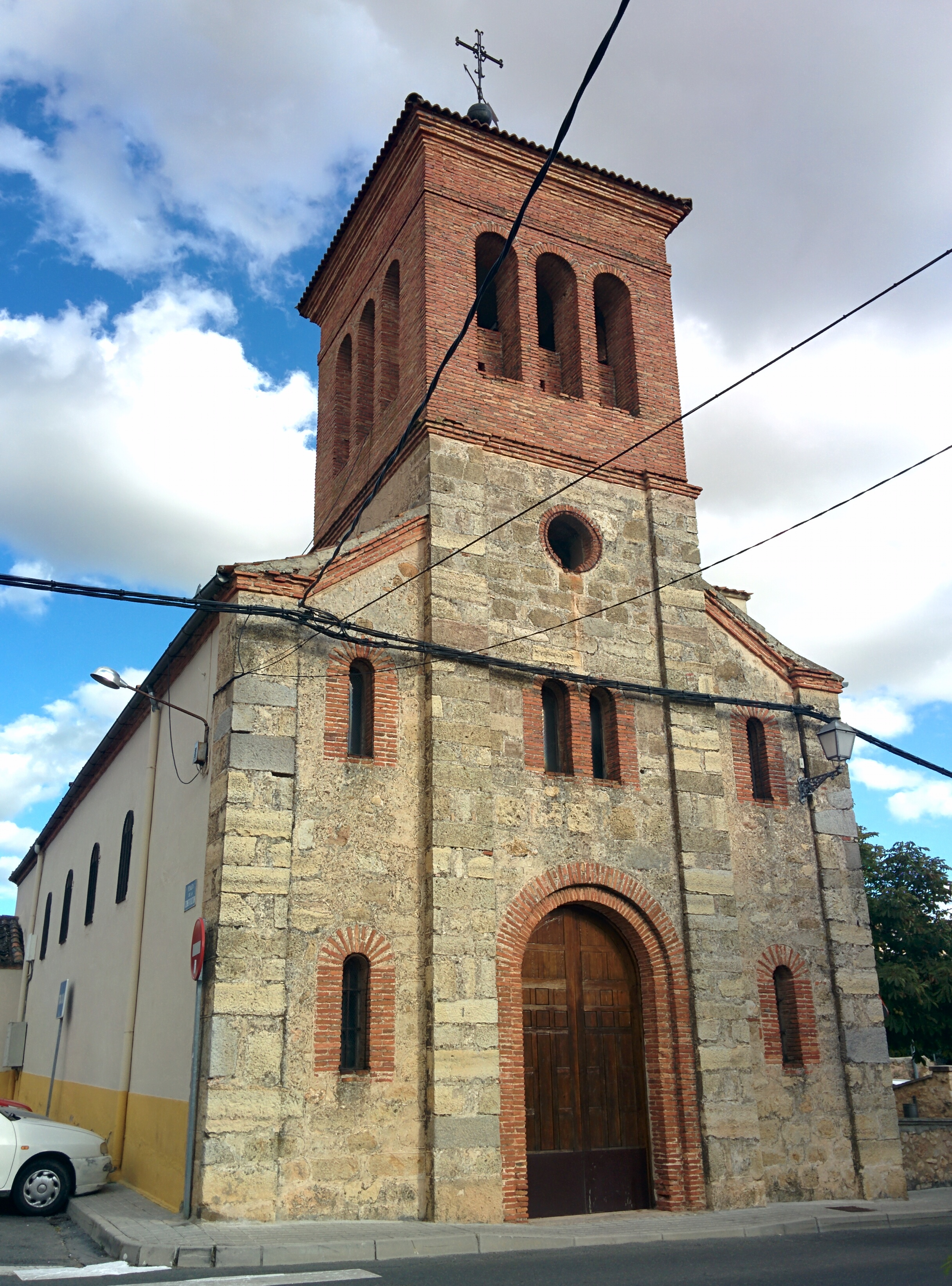 Iglesia de San Juan Bautista, La Lastrilla (Segovia, España).